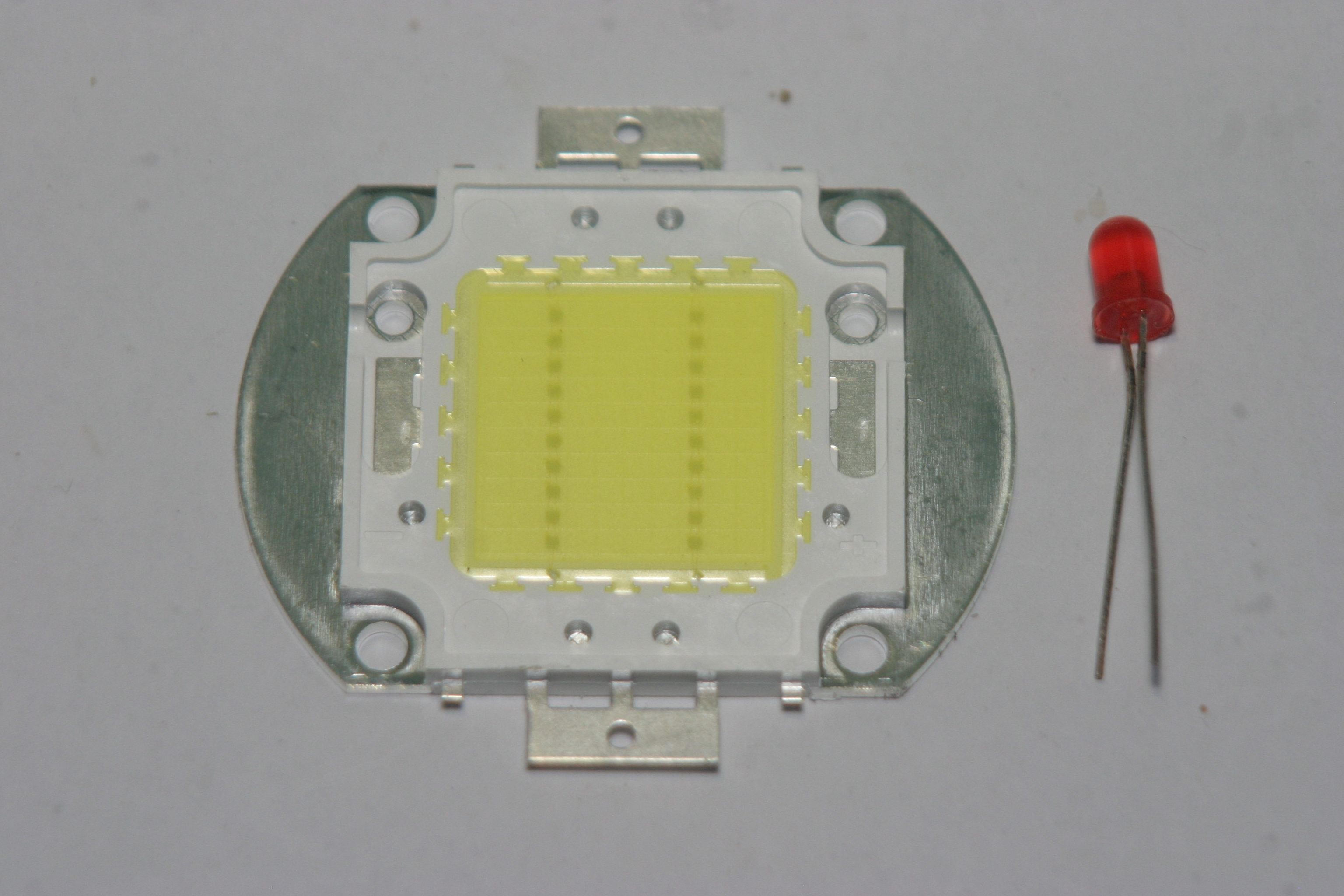 Мощный белый светодиод 20Вт (Uf=32V, I=0.7A, 1700 lm) в сравнении с красным индикаторным 5мм светодиодом.